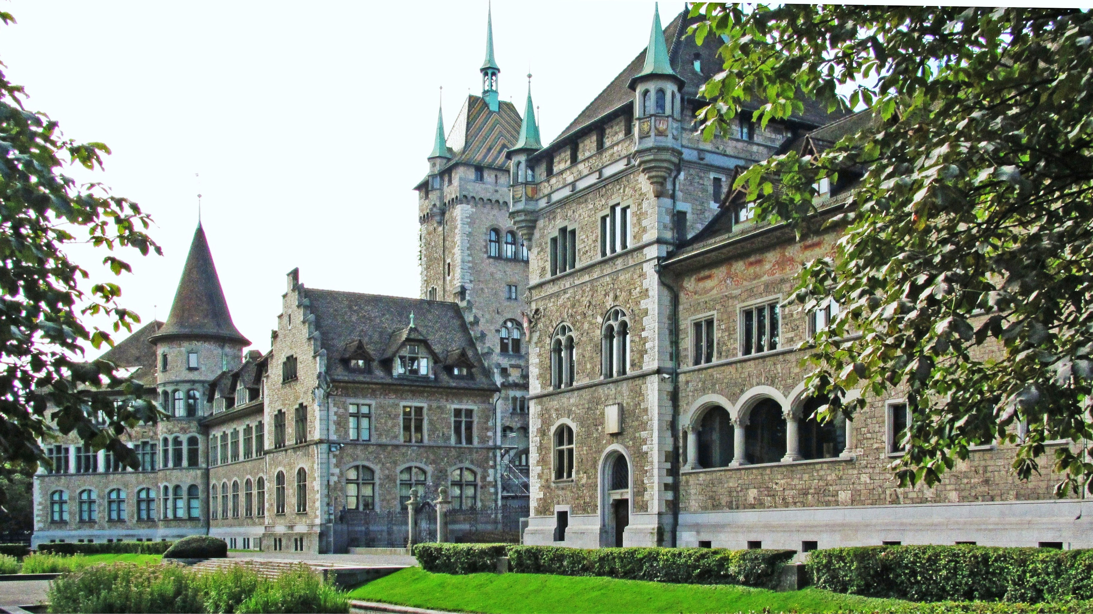 Zürich, Schweizerisches Landesmuseum, Museumstrasse 2